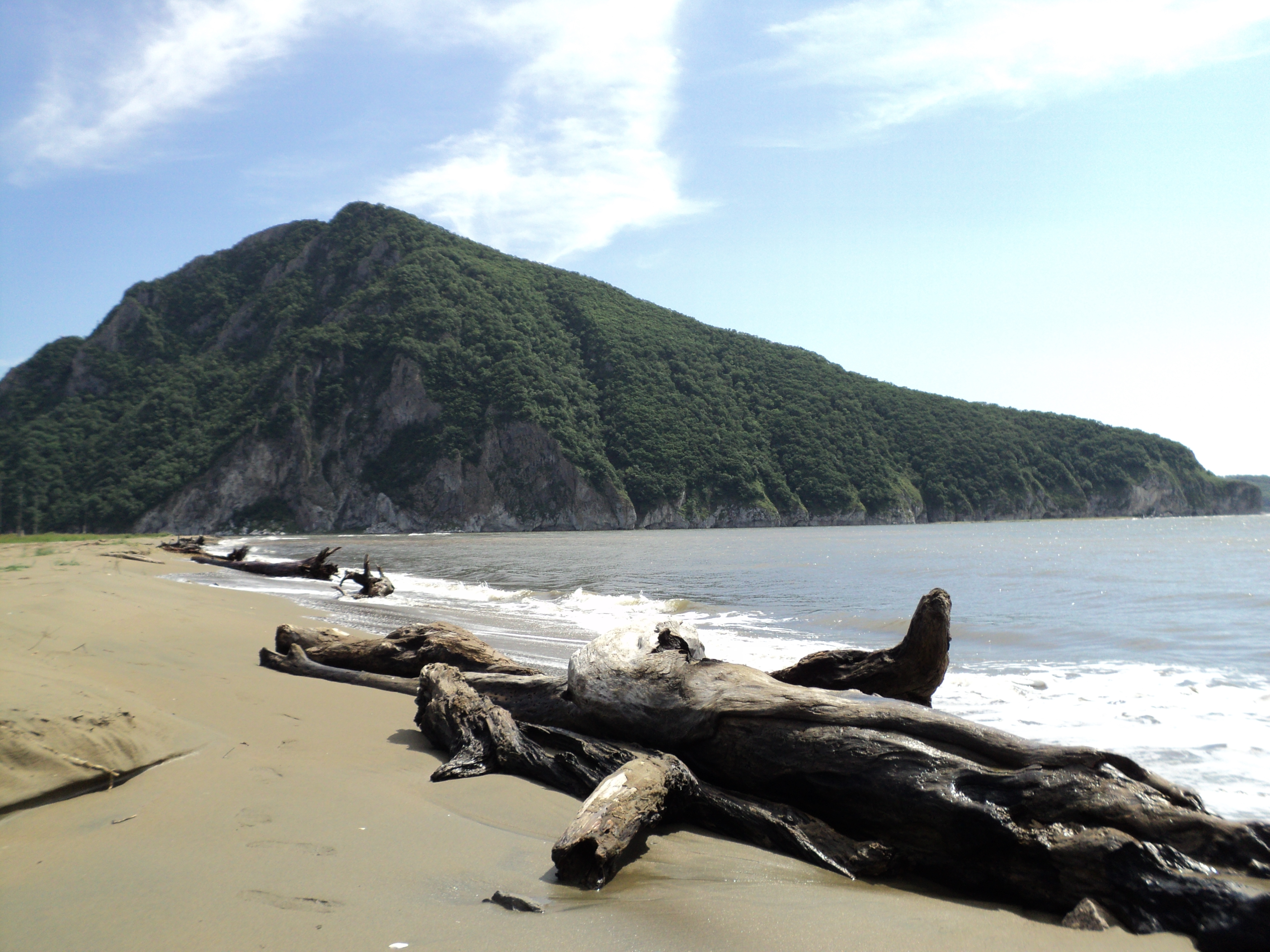 Гора Сестра у залива Находка